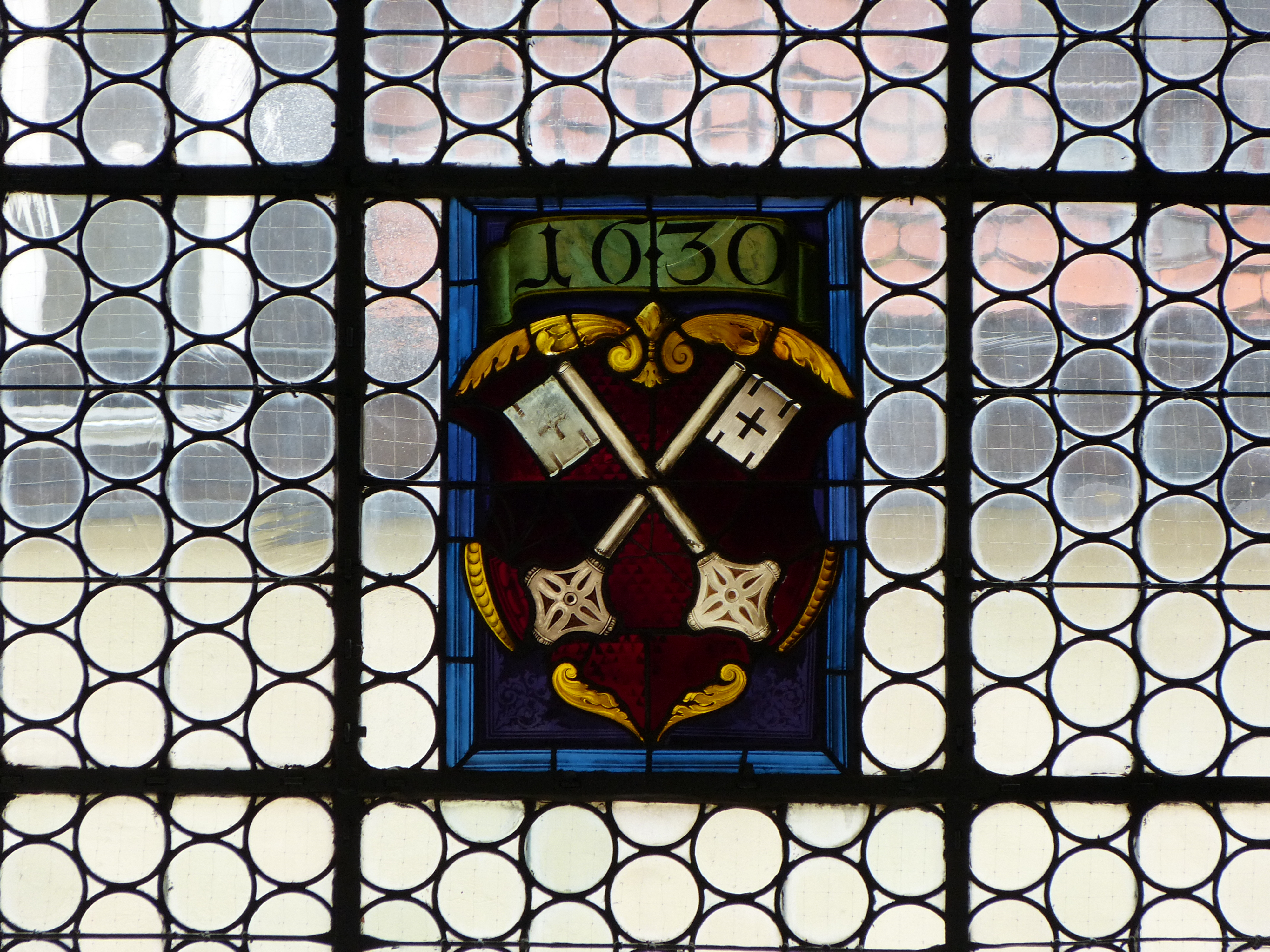 Wappen von Regensburg mit Jahreszahl 1630, im Langhaus der Dreieinigkeitskirche, Regensburg, Bayern